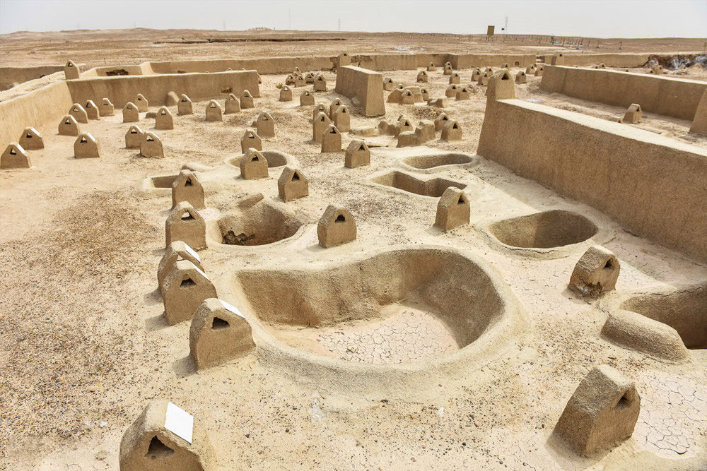 شهر سوخته نام بقایای دولت شهری باستانی در ایران است که در ۵۶ کیلومتری زابل و در حاشیه جاده زابل-زاهدان در شرق ایران در استان سیستان و بلوچستان واقع شده‌است.